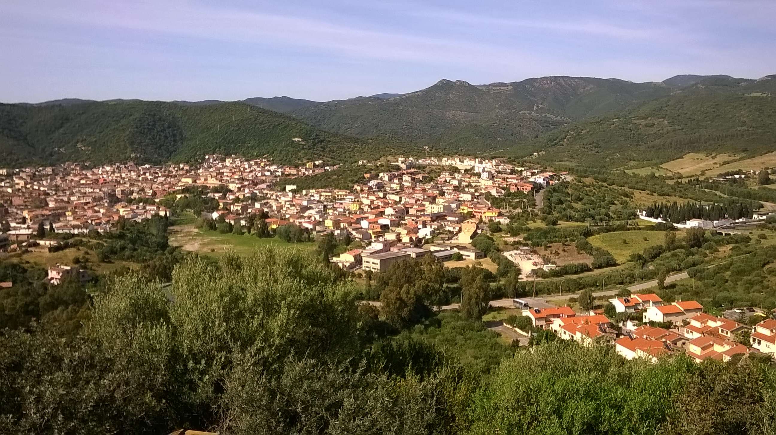 Vista parziale di Teulada dal punto panoramico di S'acqua salia, sito a sud del paese.